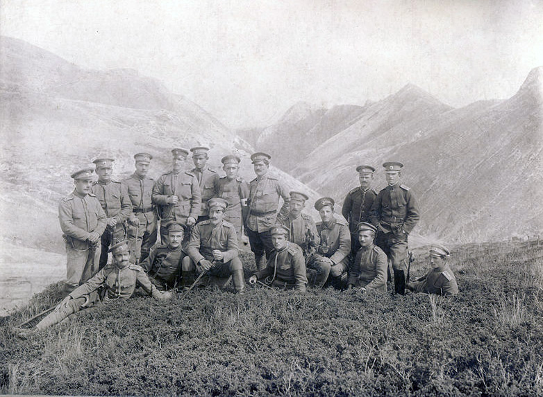 Офицери от 33-и, 34-и 58-и пехотни полкове. При Дойран, 1916 г.